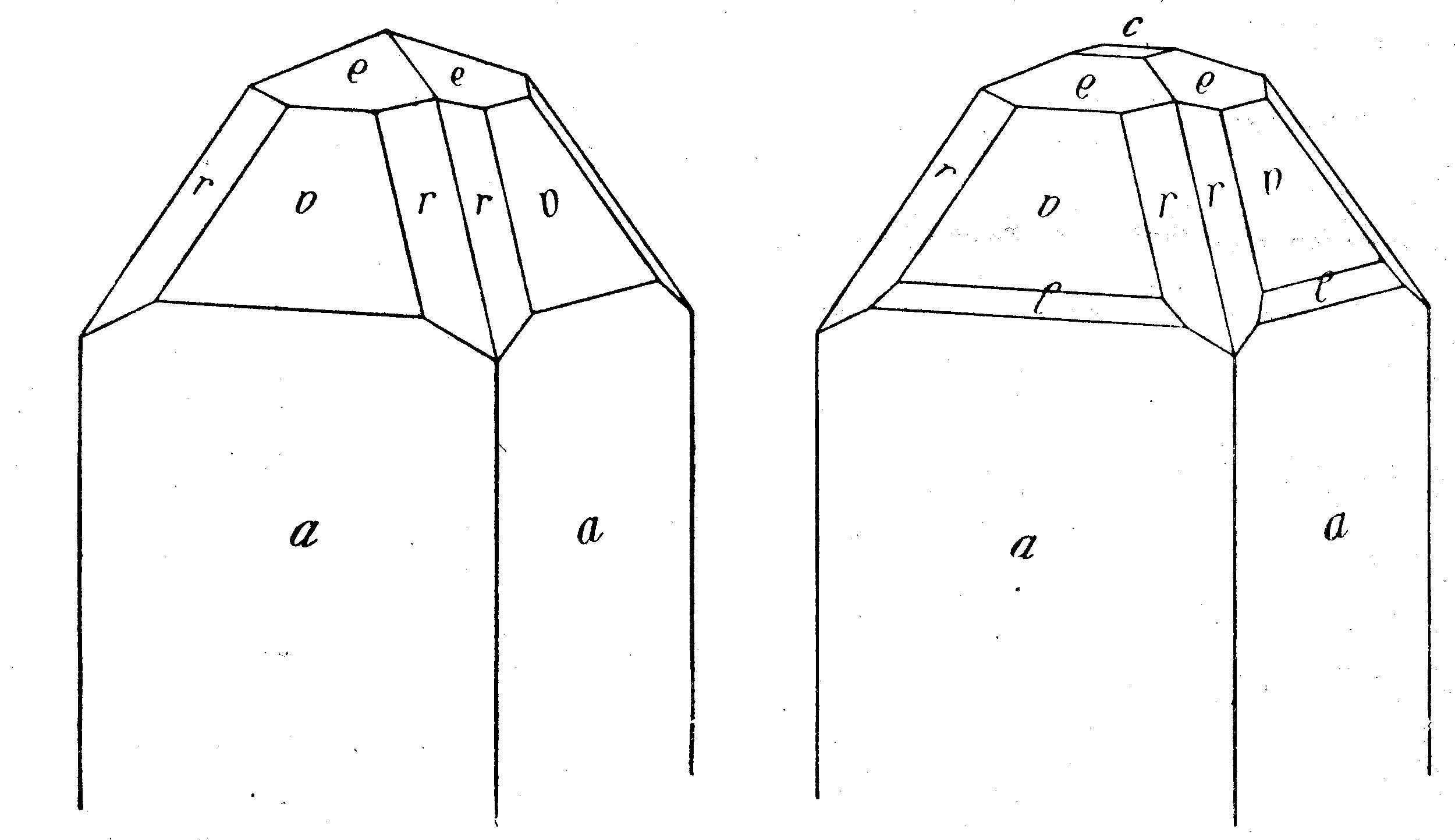 Schafarzikit